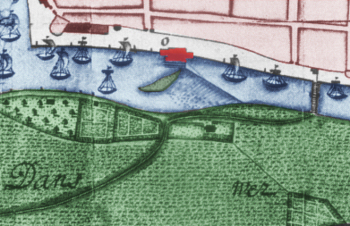 Karte von Münden mit der Graumühle und dem Tanzwerder, nachträglich koloriert, Karte nicht genordet, Norden ist links